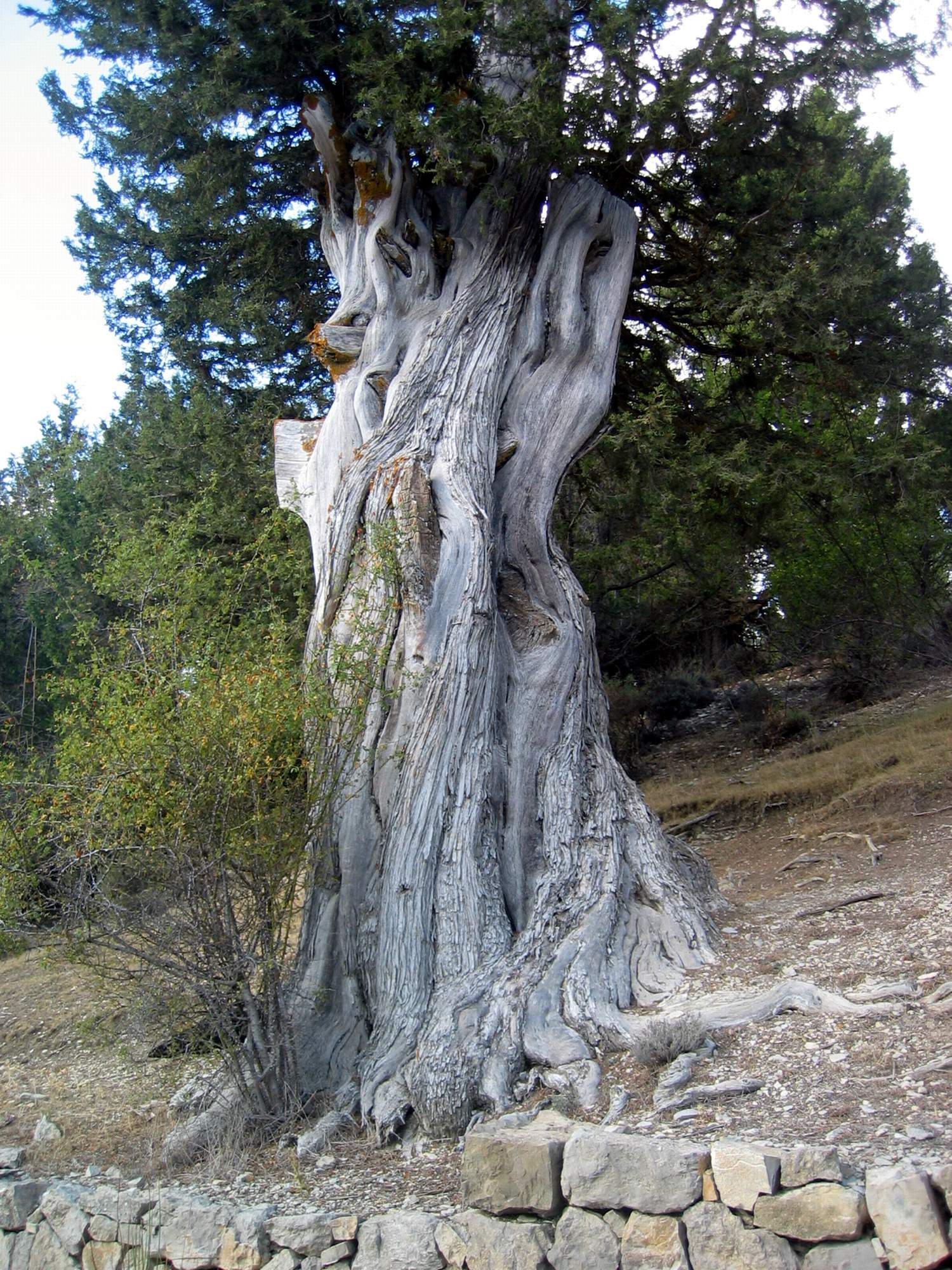 Ejemplar de sabina en el Sabinar de las Blancas del Parque Natural de Puebla de San Miguel (Valencia), 2014.